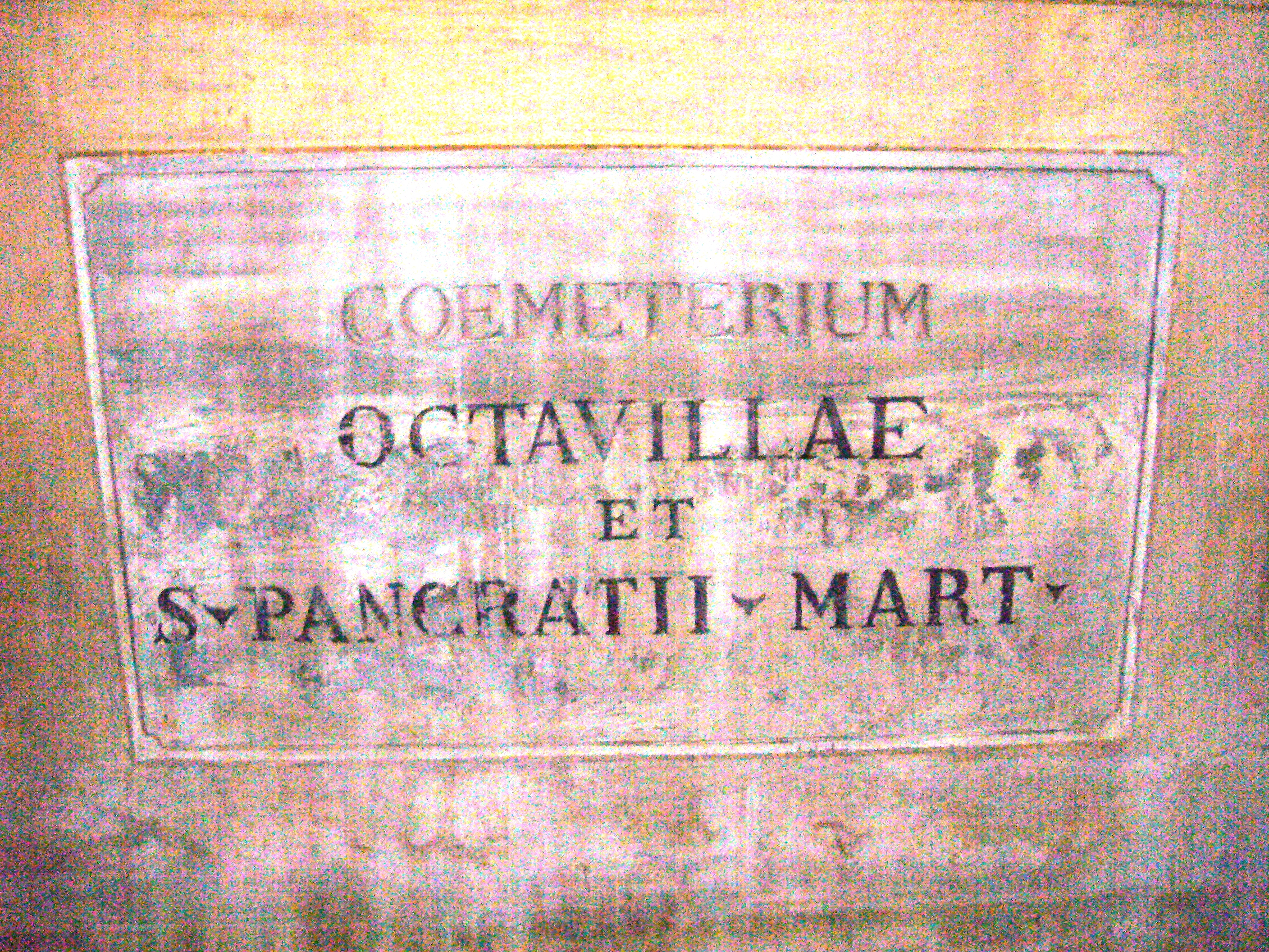 Roma, basilica s. Pancrazio. Catacombe di Ottavilla e di s. Pancrazio